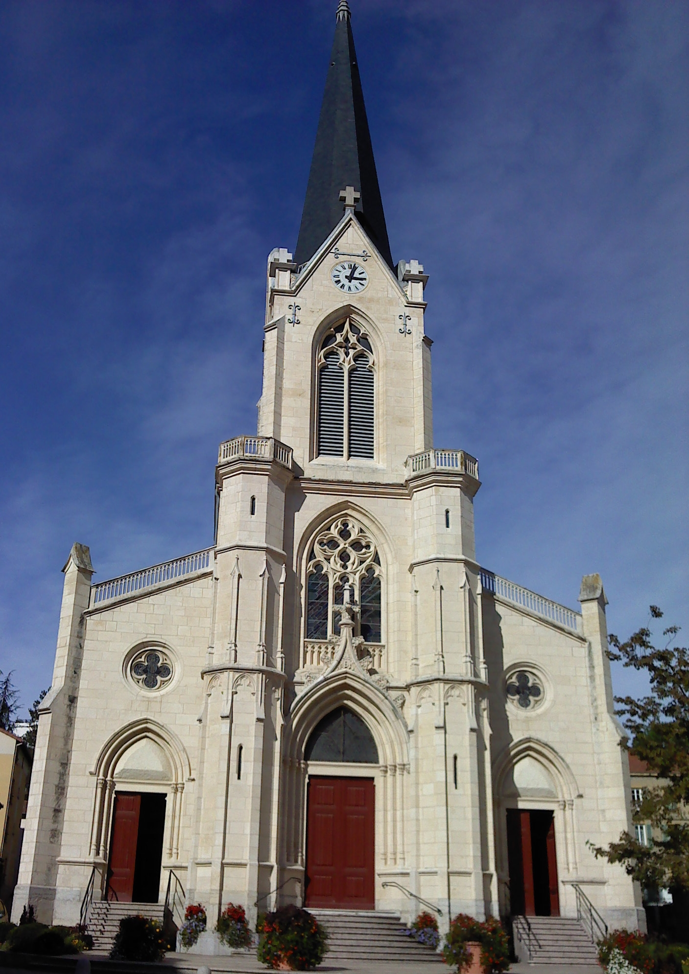 église de pontcharra sur turdine (Rhône)